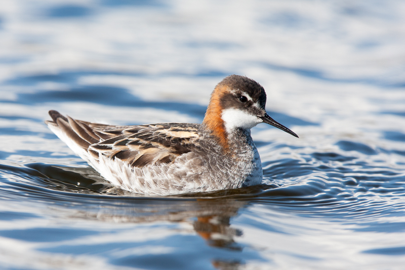 Phalaropus lobatus Male, breeding plumage